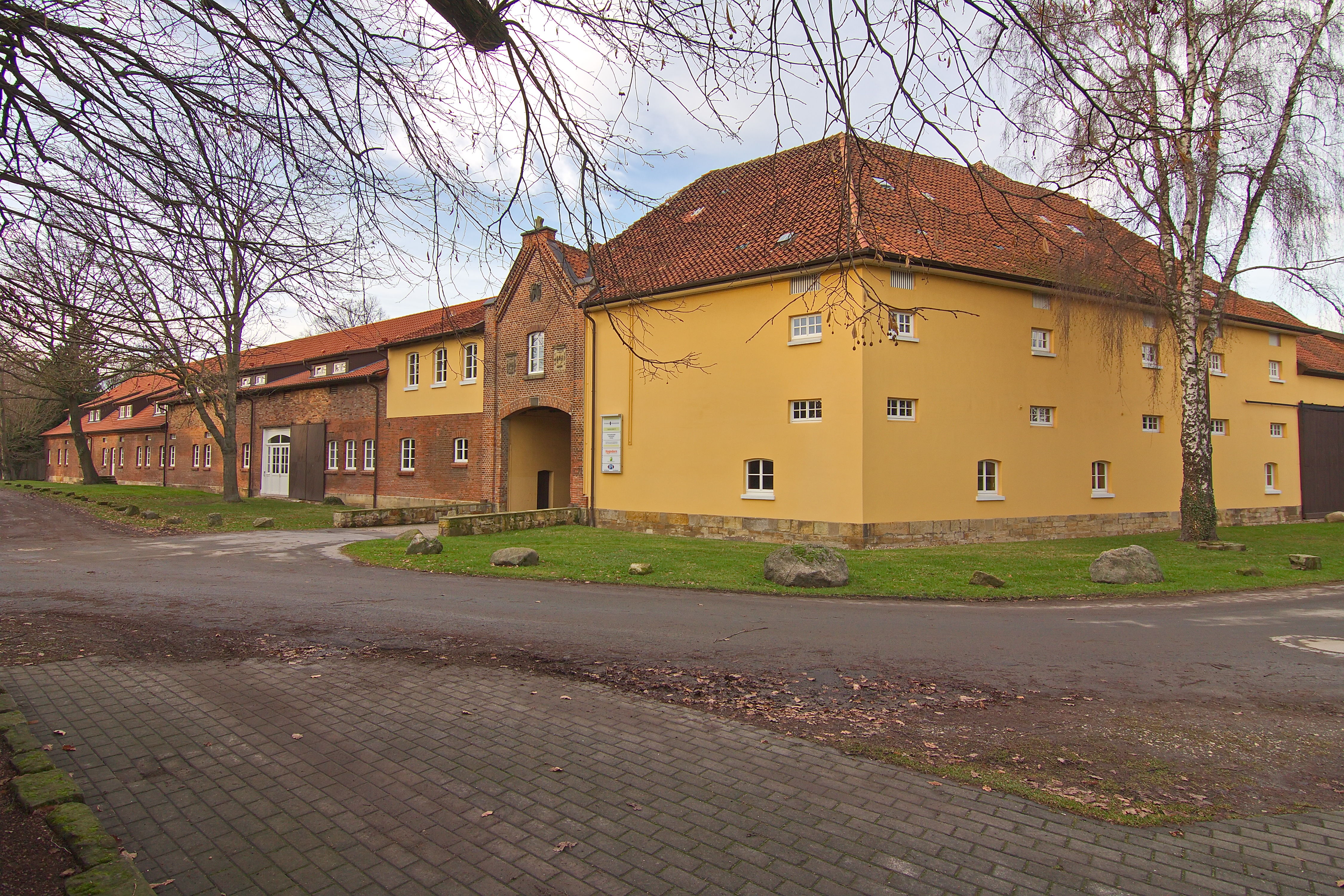 Das Rittergut in Großgoltern (Barsinghausen) wurde 1558 von Herzog Erich zu Braunschweig-Lüneburg an den Rittmeister Ernst von Alten übertragen.